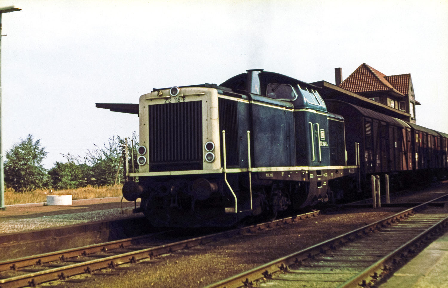 Diesellokomotive der Baureihe 212 verläßt mit einem Güterzug am Nachmittag im Bahnhof Dannenberg Ost mit Ziel Uelzen.